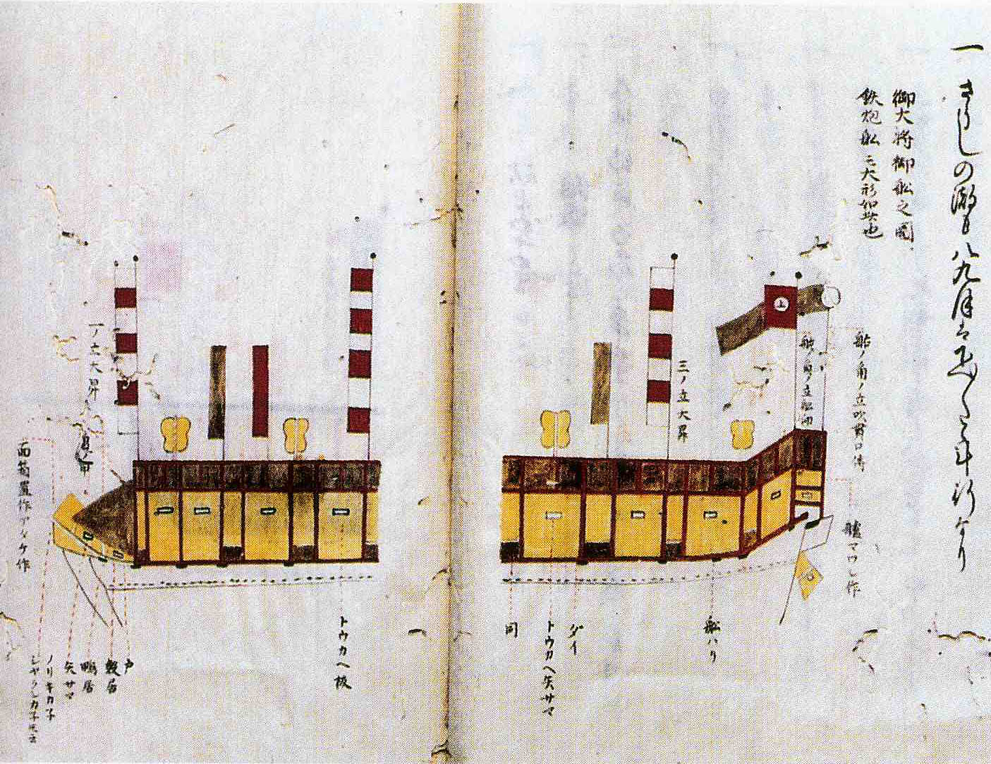 能島家伝 御大将御船之図